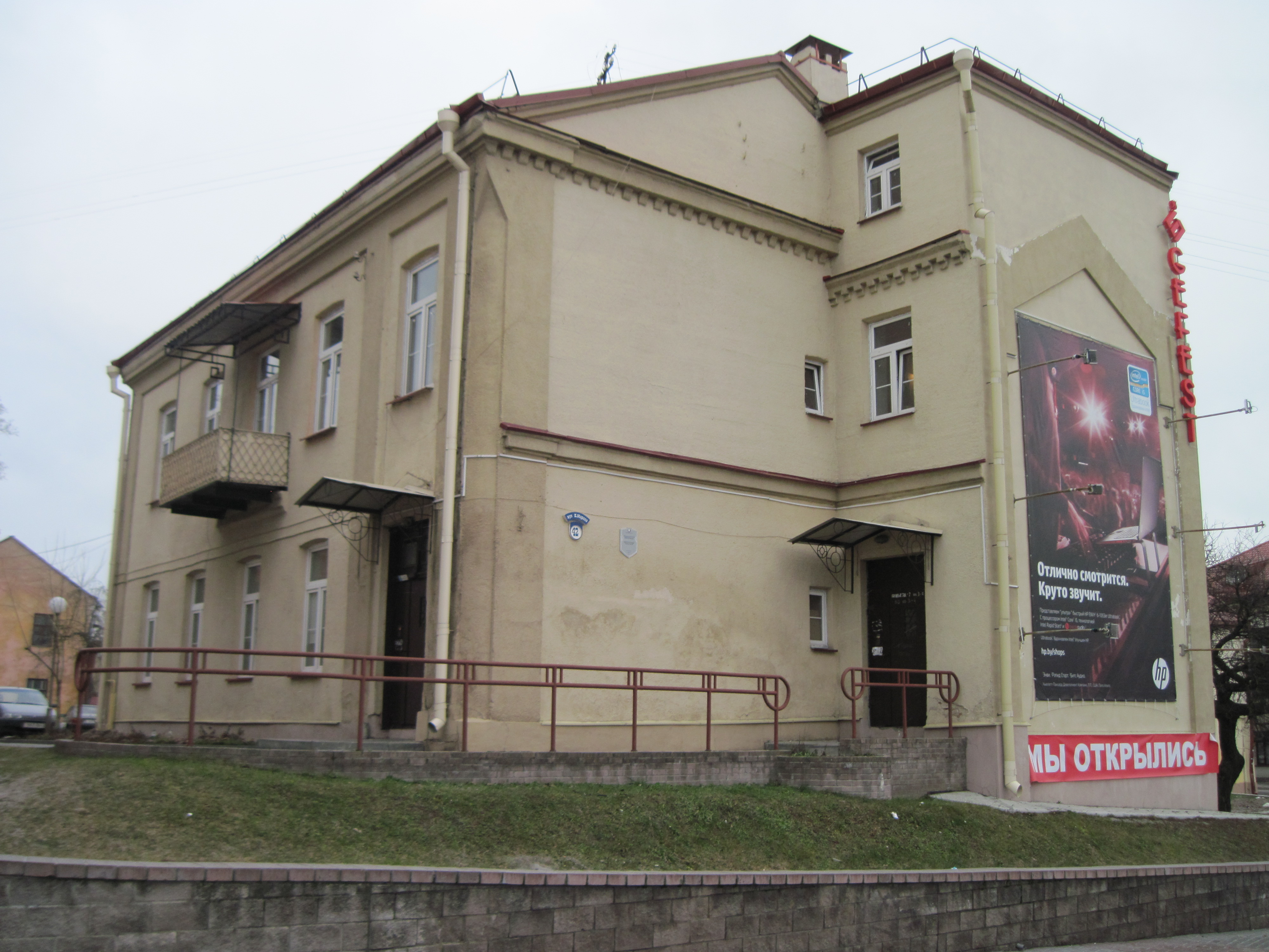 Беларуская (тарашкевіца): Забудова гістарычнага цэнтра Гродна